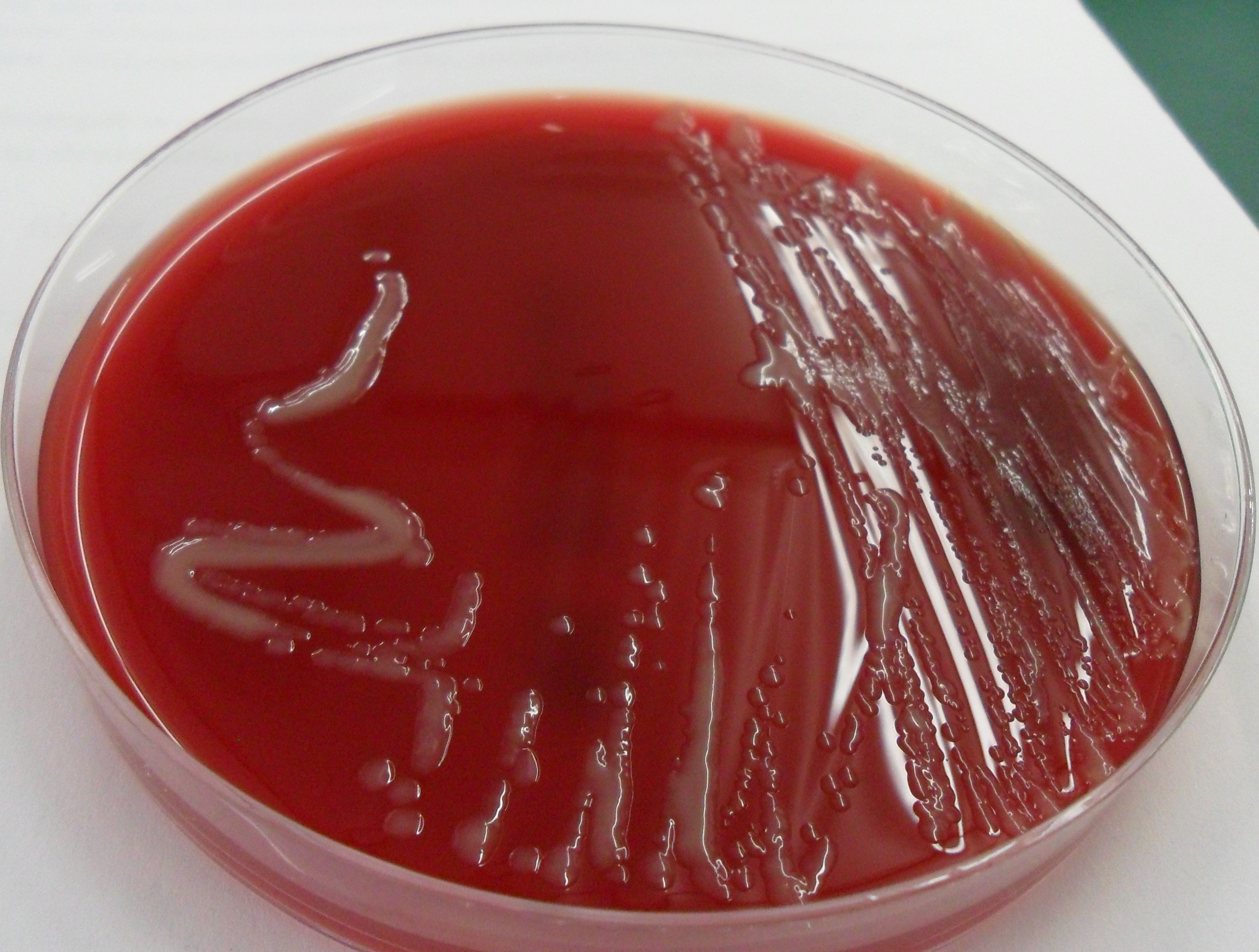 Meningokokken